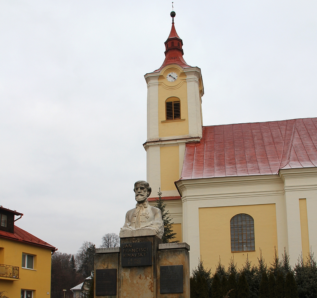 Monument